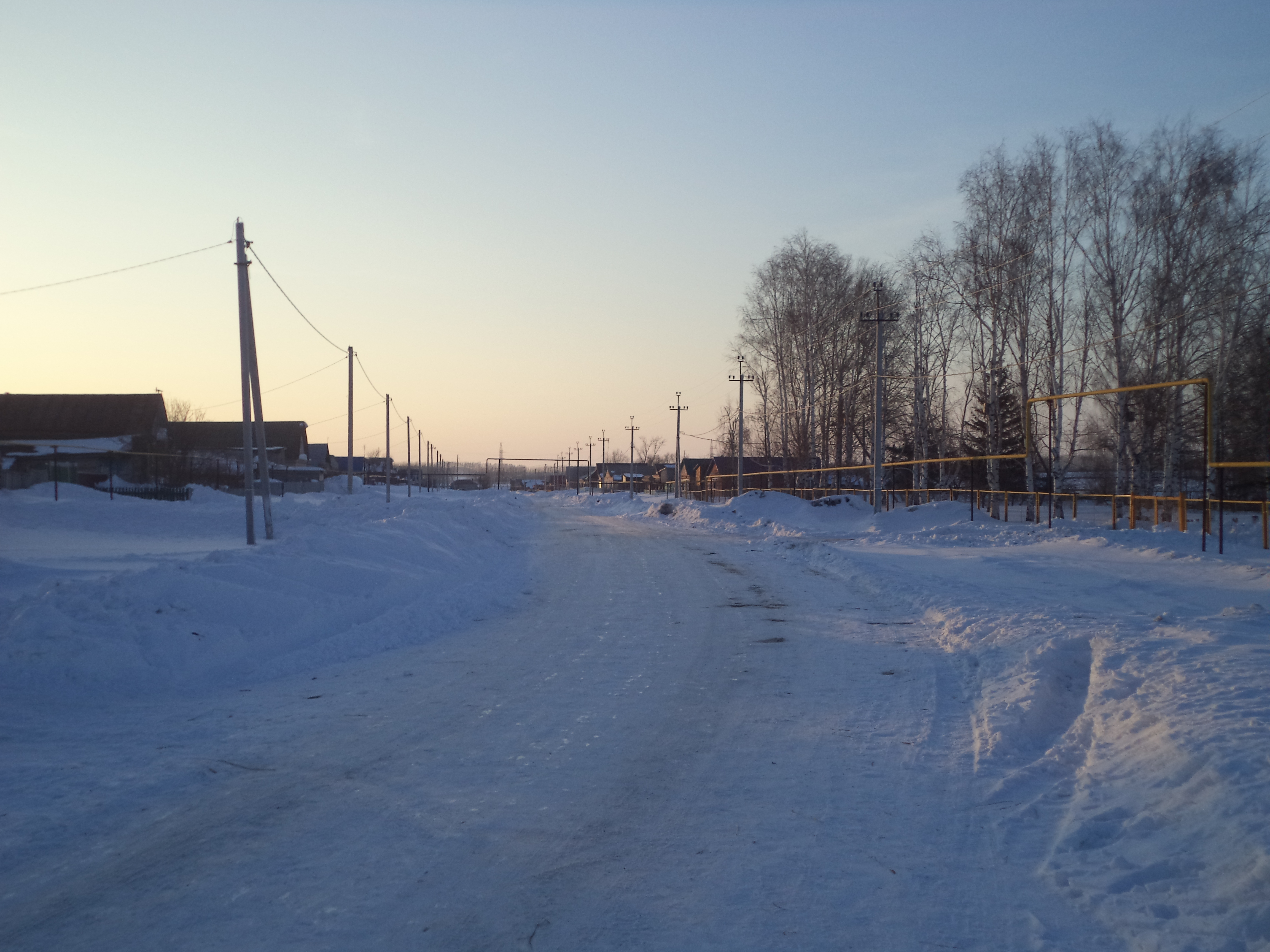 Вид улицы Центральной зимой